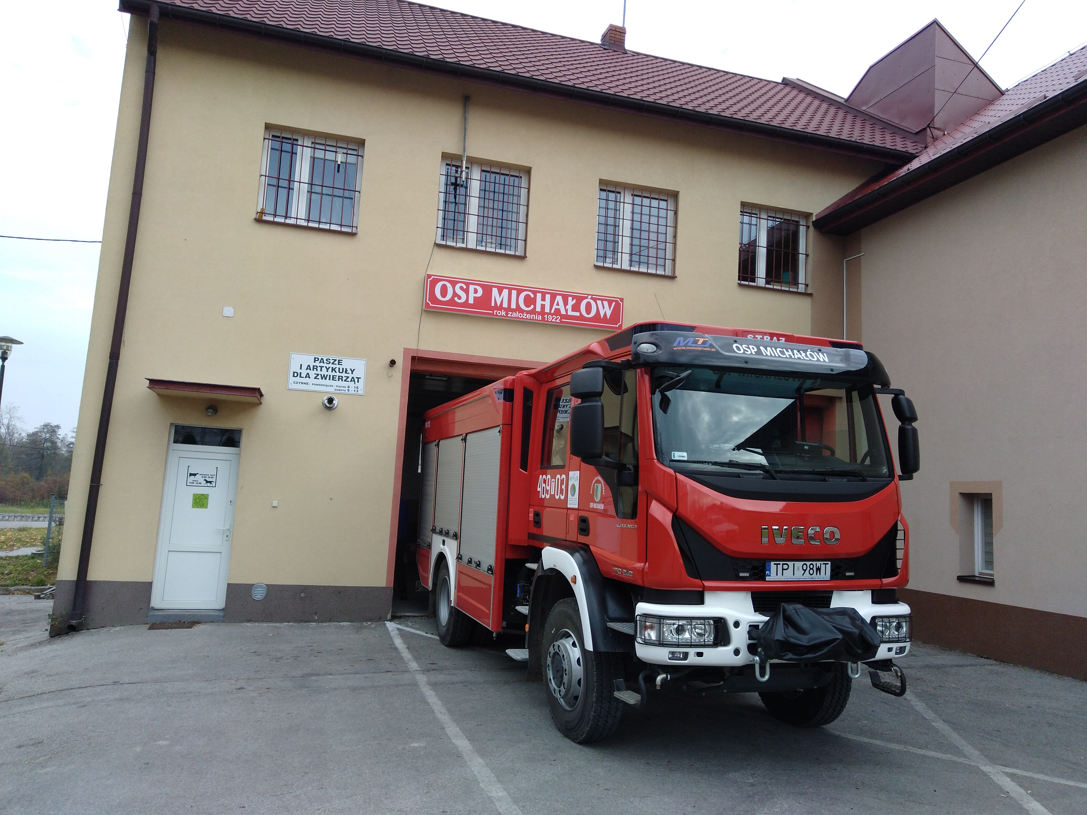 OSP Michałów